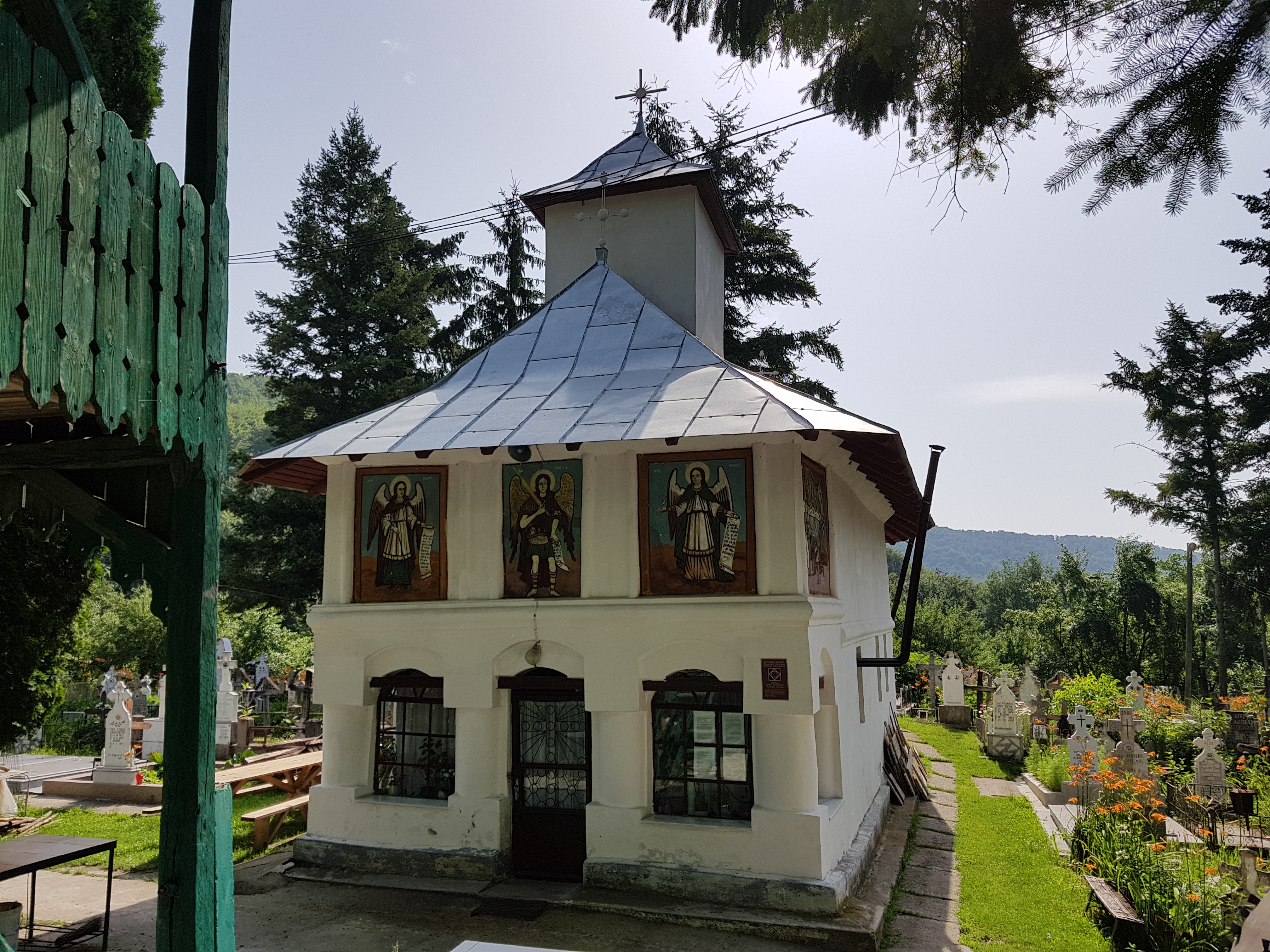 Biserica fostei mănăstiri „Sf. Arhangheli” - municipiul Râmnicu Vâlcea